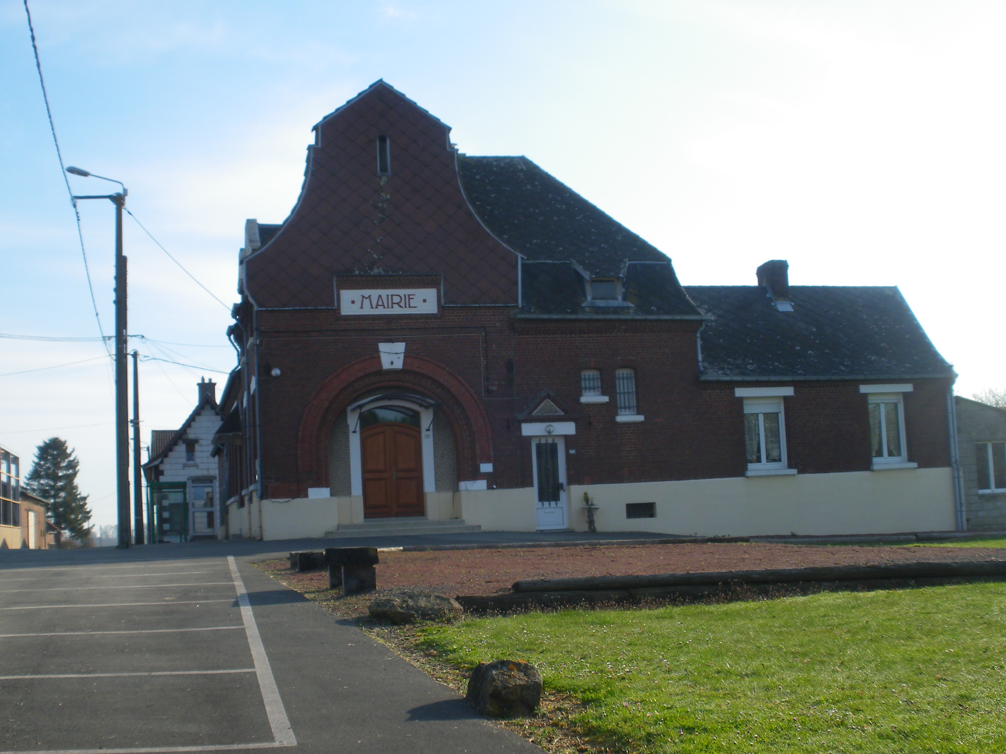 Vue de la mairie de Bancourt.